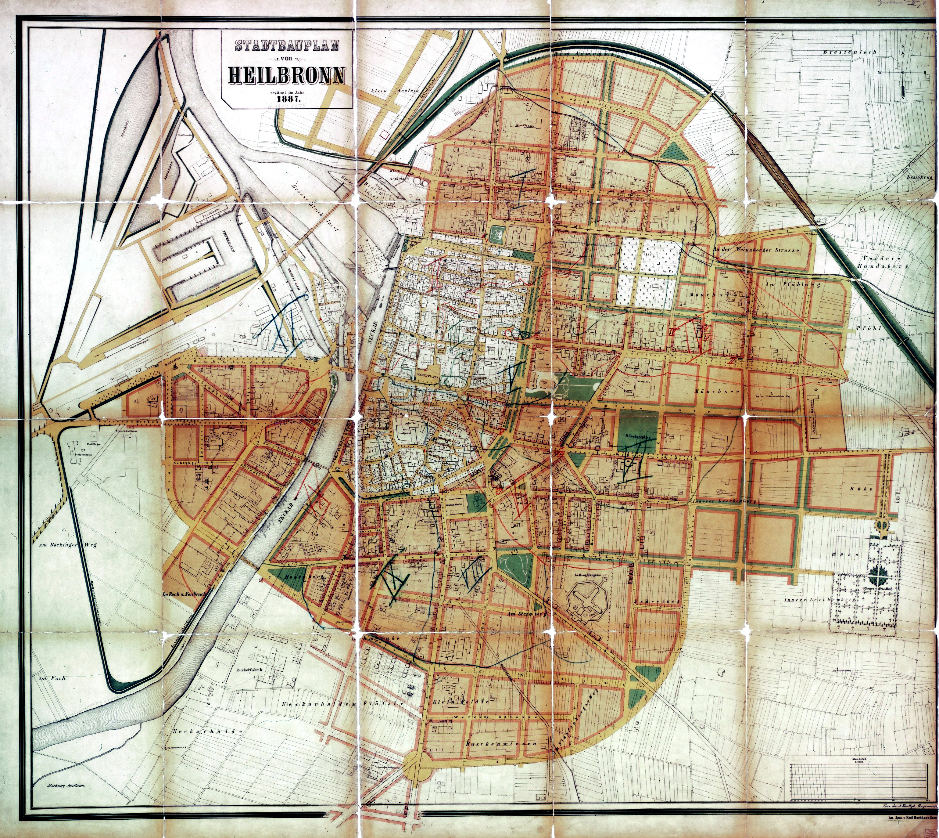 Stadtbauplan von Heilbronn, Verlag: Art. Anst. v. Emil Hochdanz, Stuttgart 1887; Maßstab 1:2500